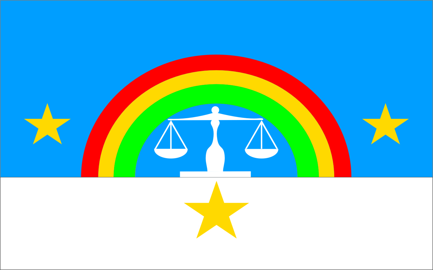 Bandeira do Município de Canhotinho, Pernambuco